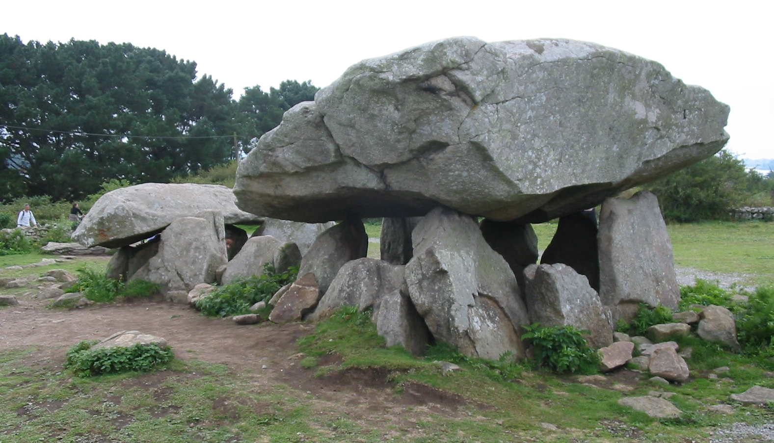 dolmen, Penhap, Île-aux-Moines, Morbihan